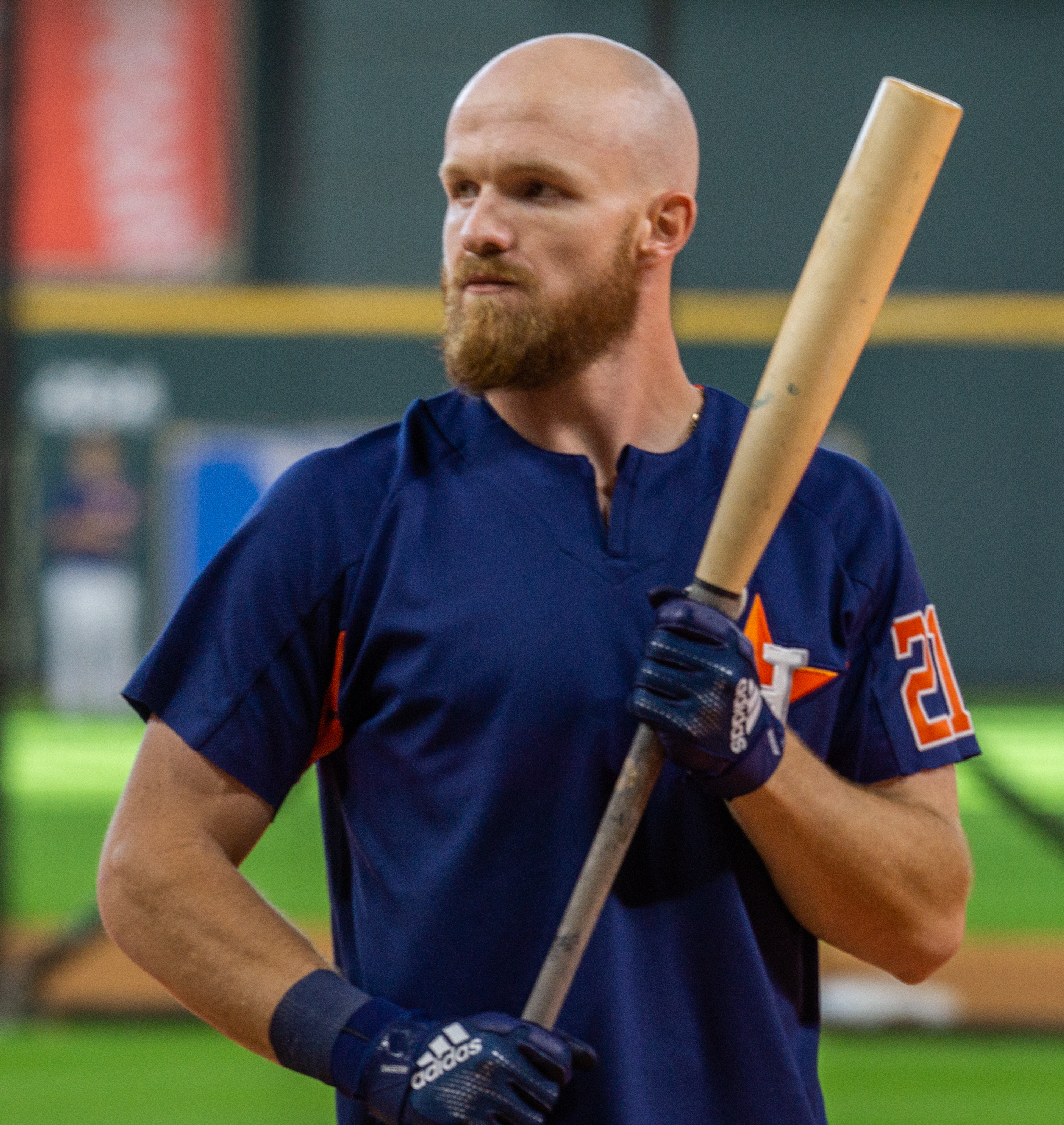 Derek Fisher